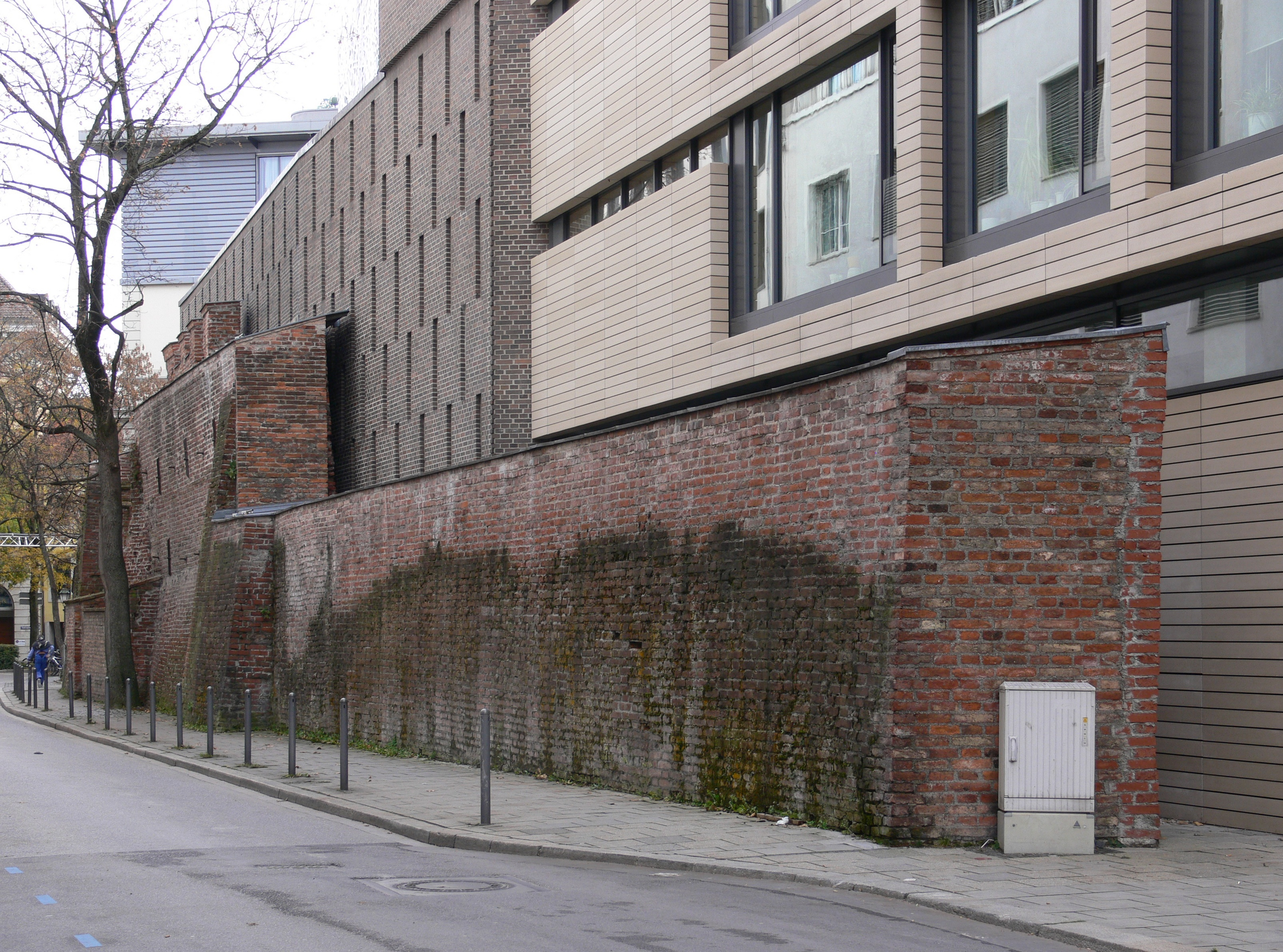 München, Kreuzviertel, Jungfernturmstraße mit dem letzten oberirdischen Rest der ehem. inneren Stadtmauer; Rohziegelbau, um 1300 / 15. Jh.